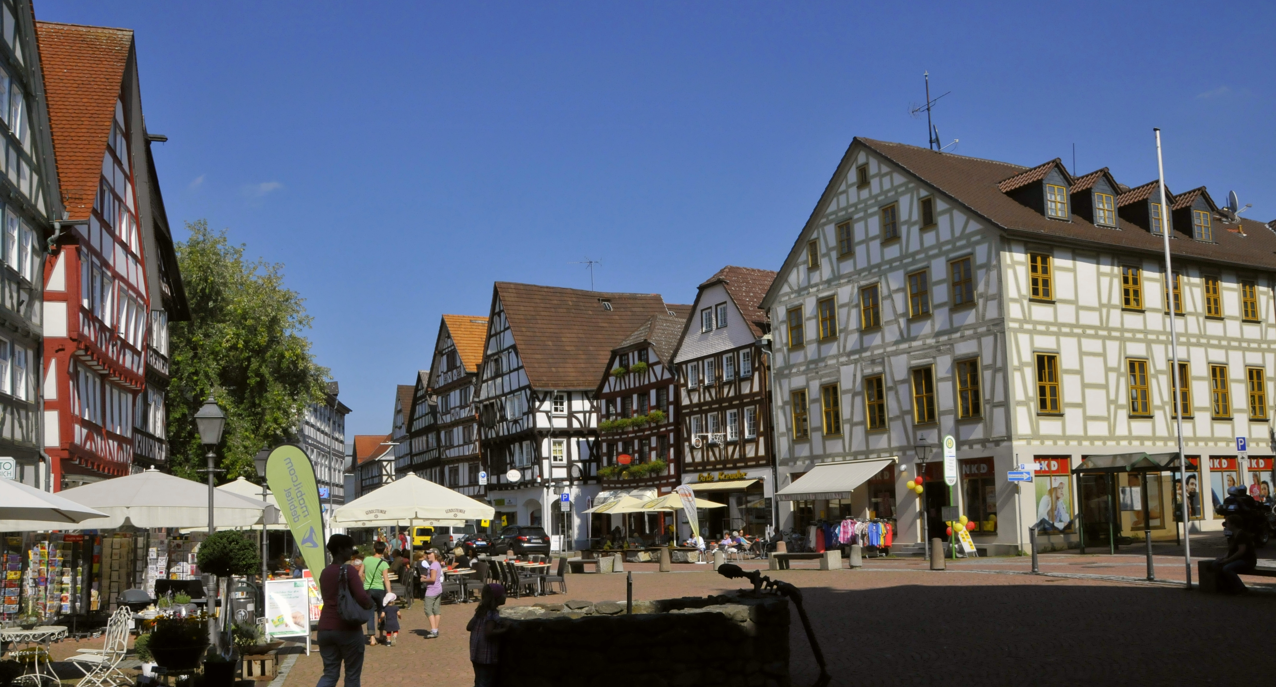 Grünberg (Hessen), Marktplatz